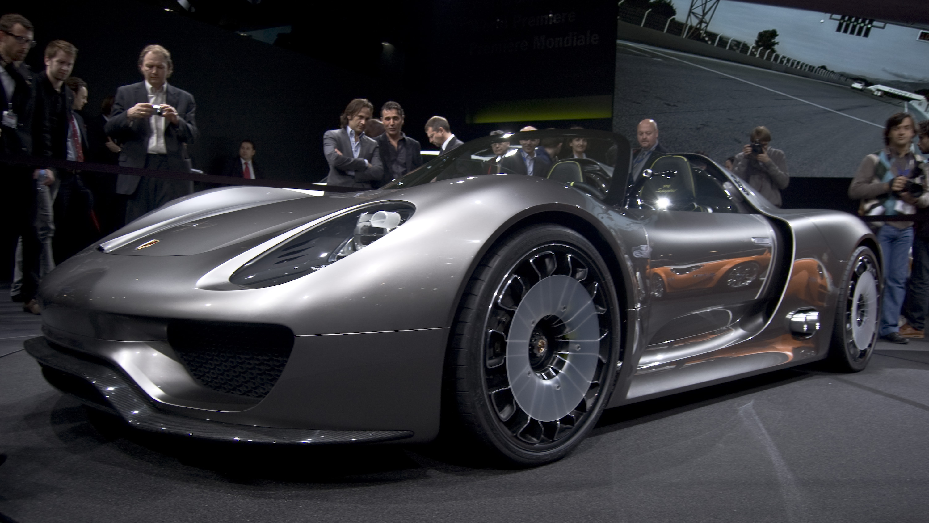 Porsche 918 Spyder en el Salón de Ginebra 2010.